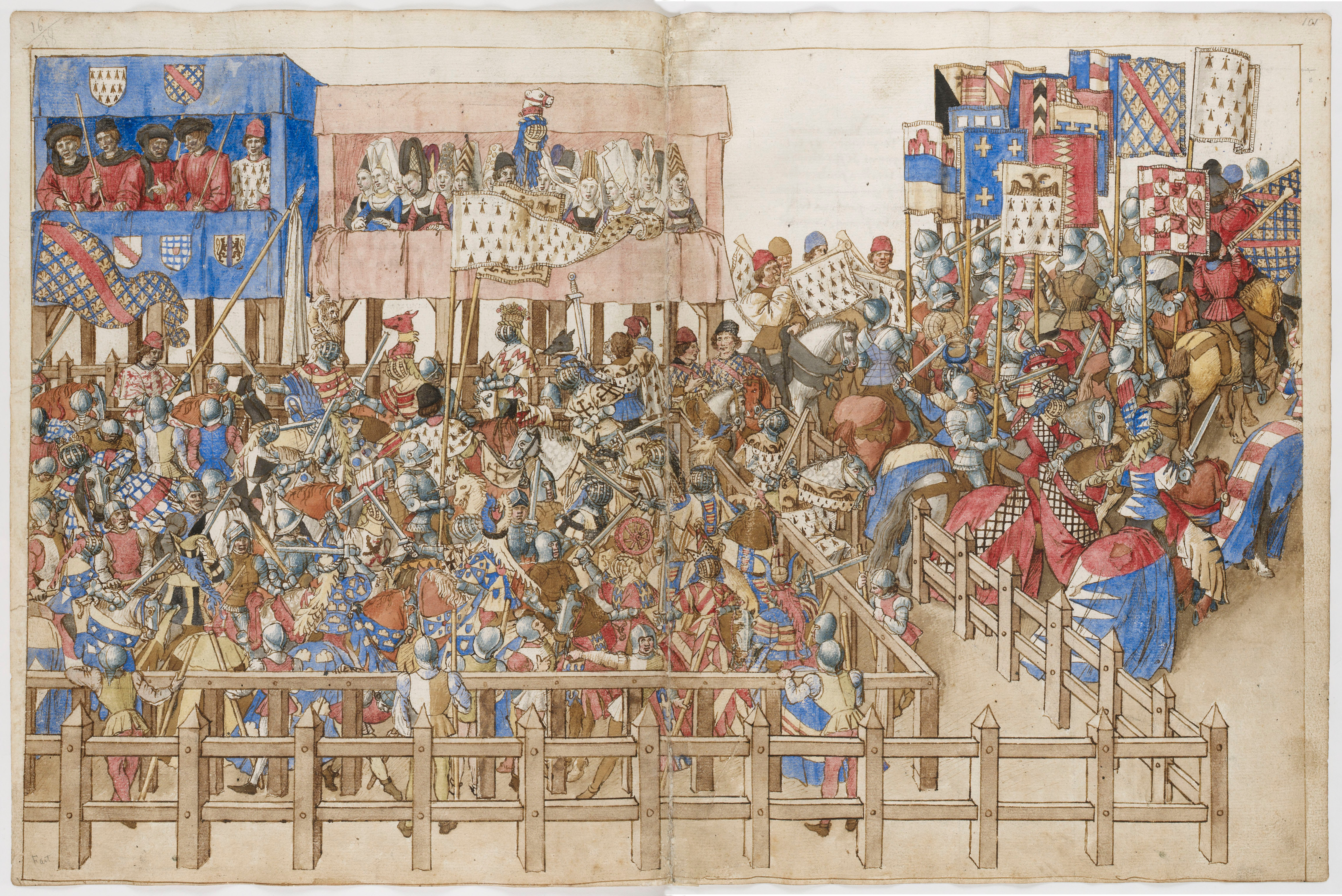 Enluminure du Livre des tournois du Roi René d'Anjou, dessins de Barthélemy d'Eyck